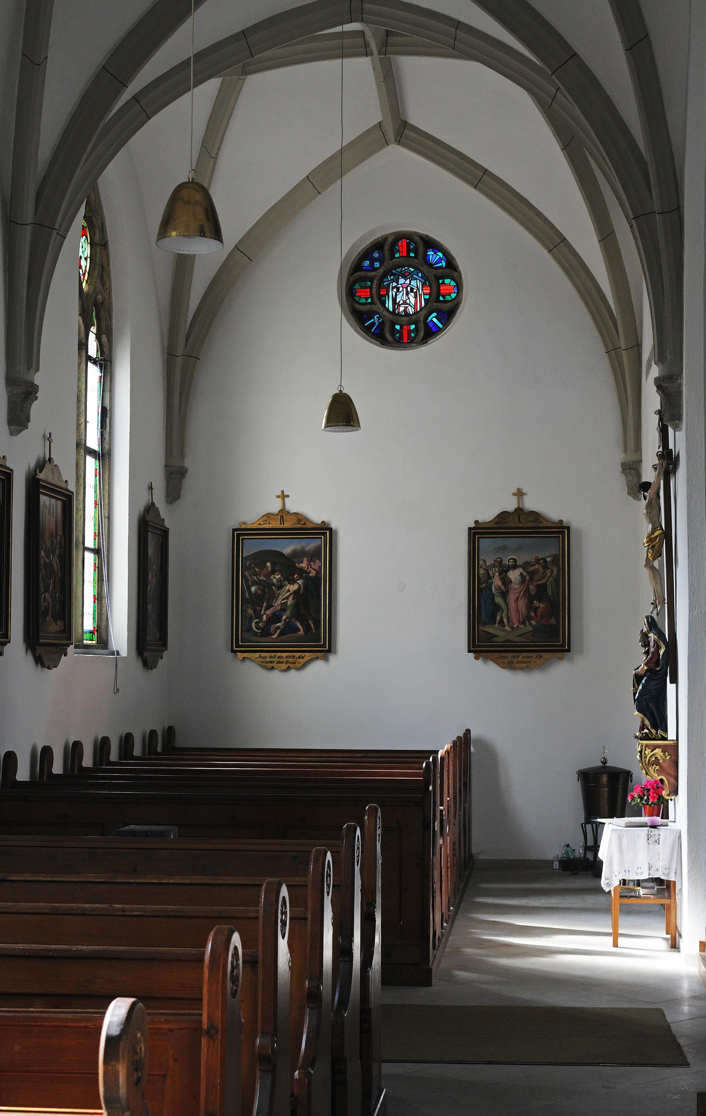 Das südliche Seitenschiff der Mollner Pfarrkirche mit Blick zur Westwand